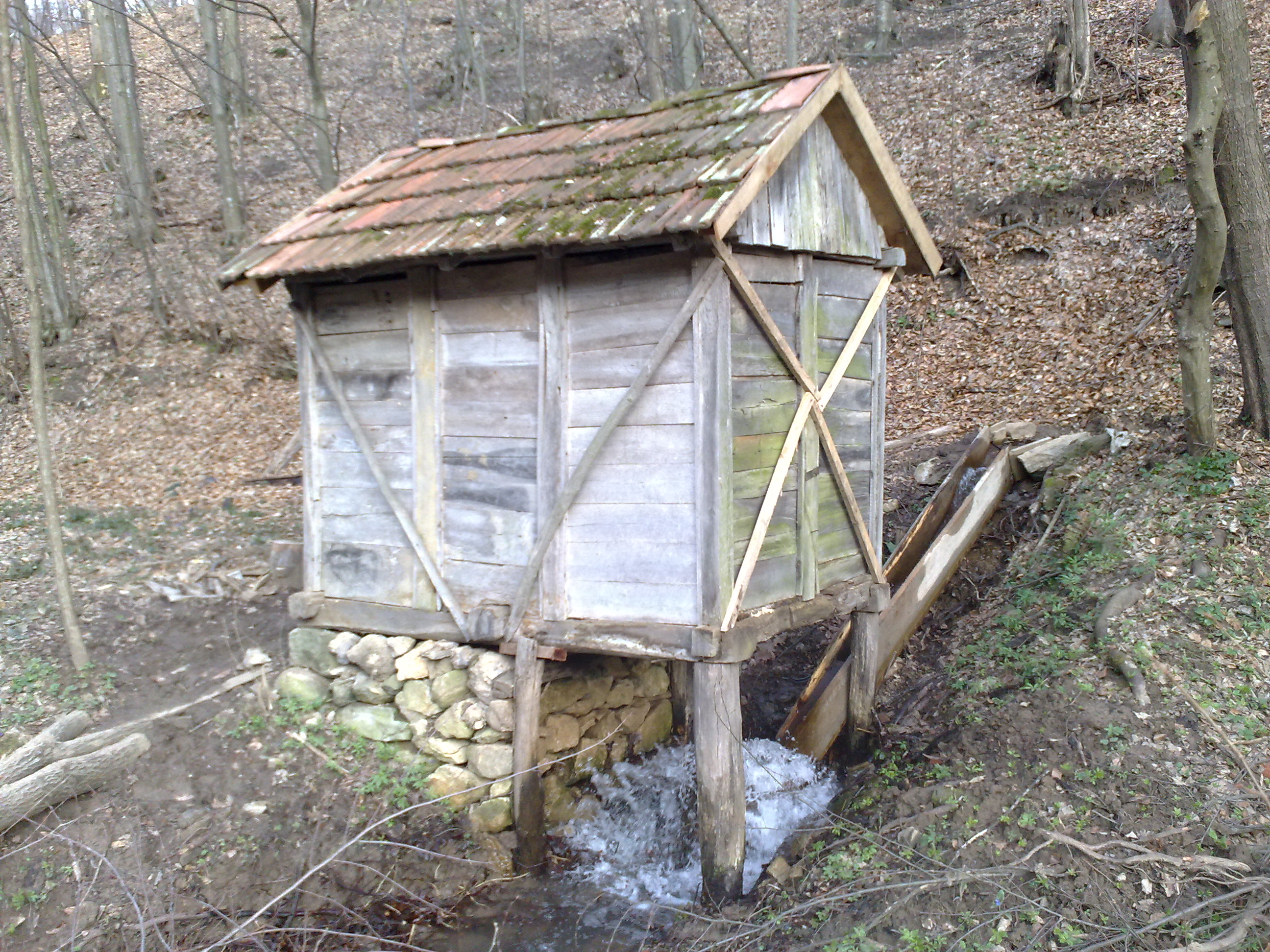 Воденица у Тупанцима